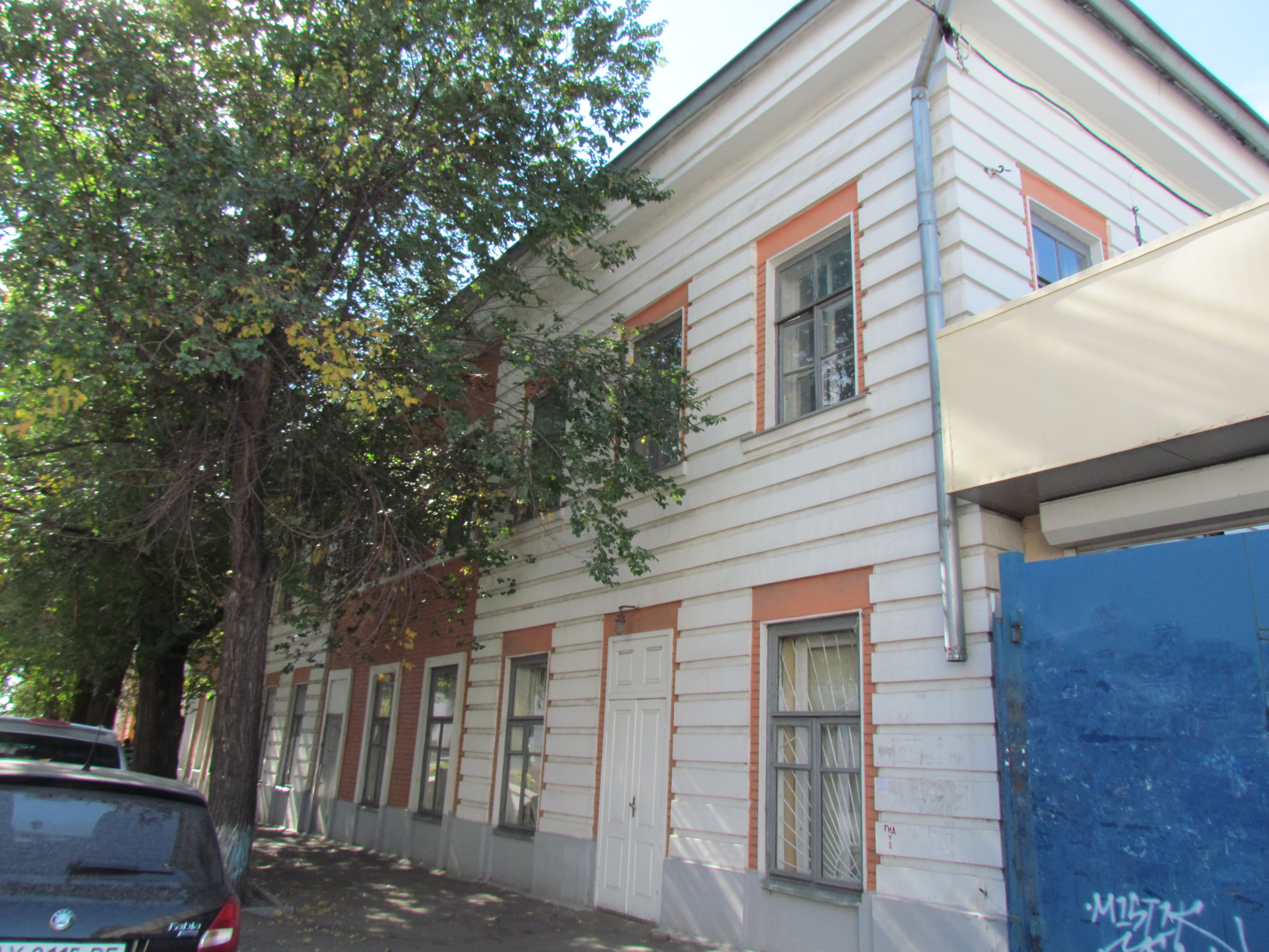 Україна, Харків, вул. Університетська, 12